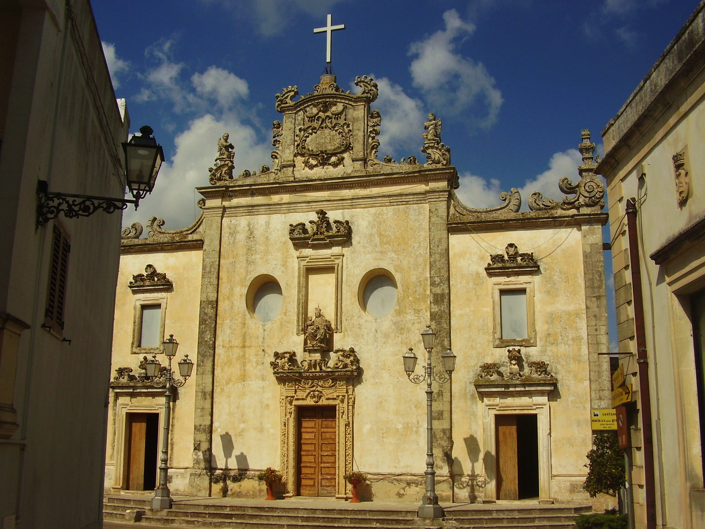 Santuario Madonna delle Grazie Sanarica, Lecce